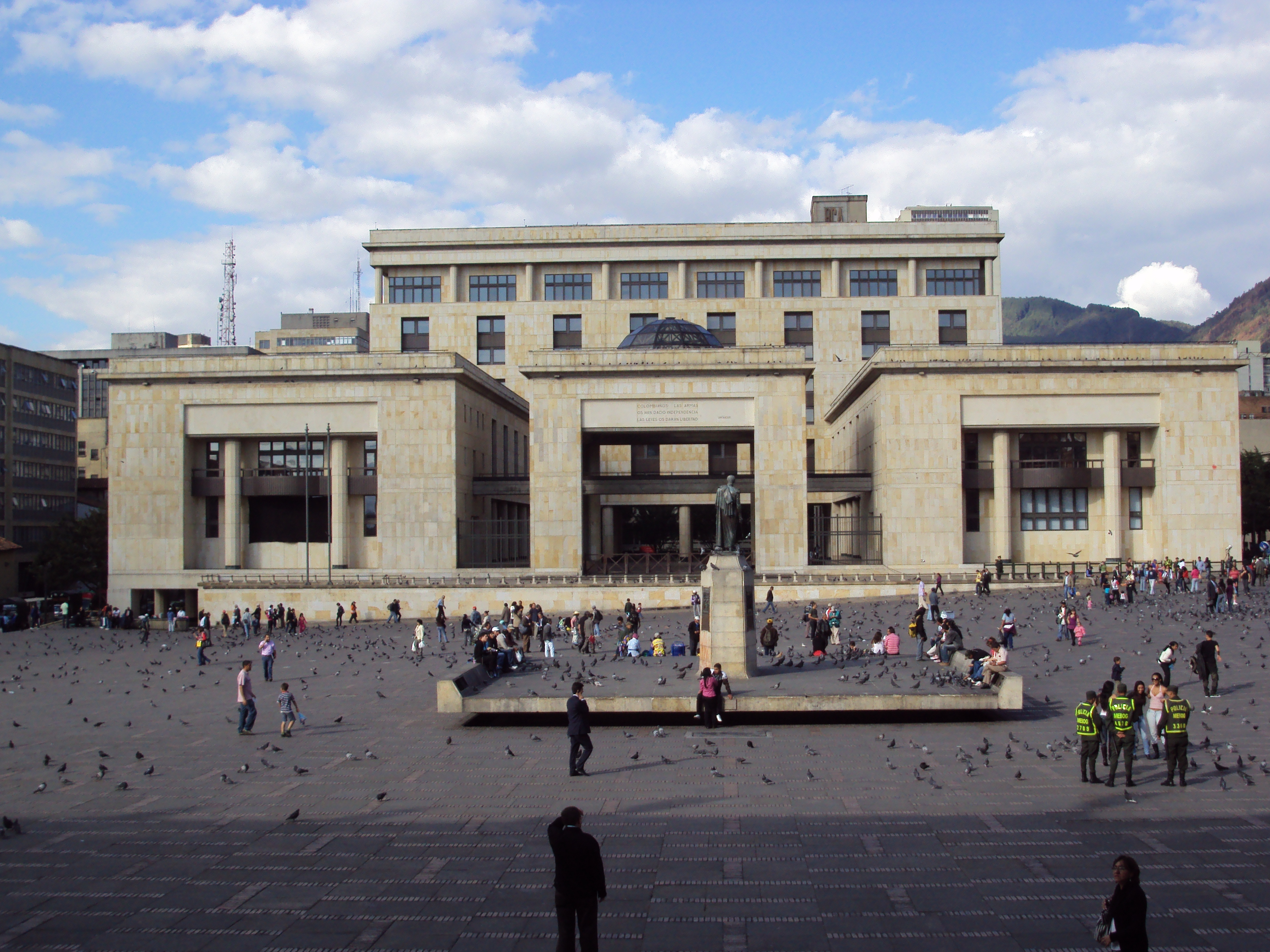 Plaza de Bolívar